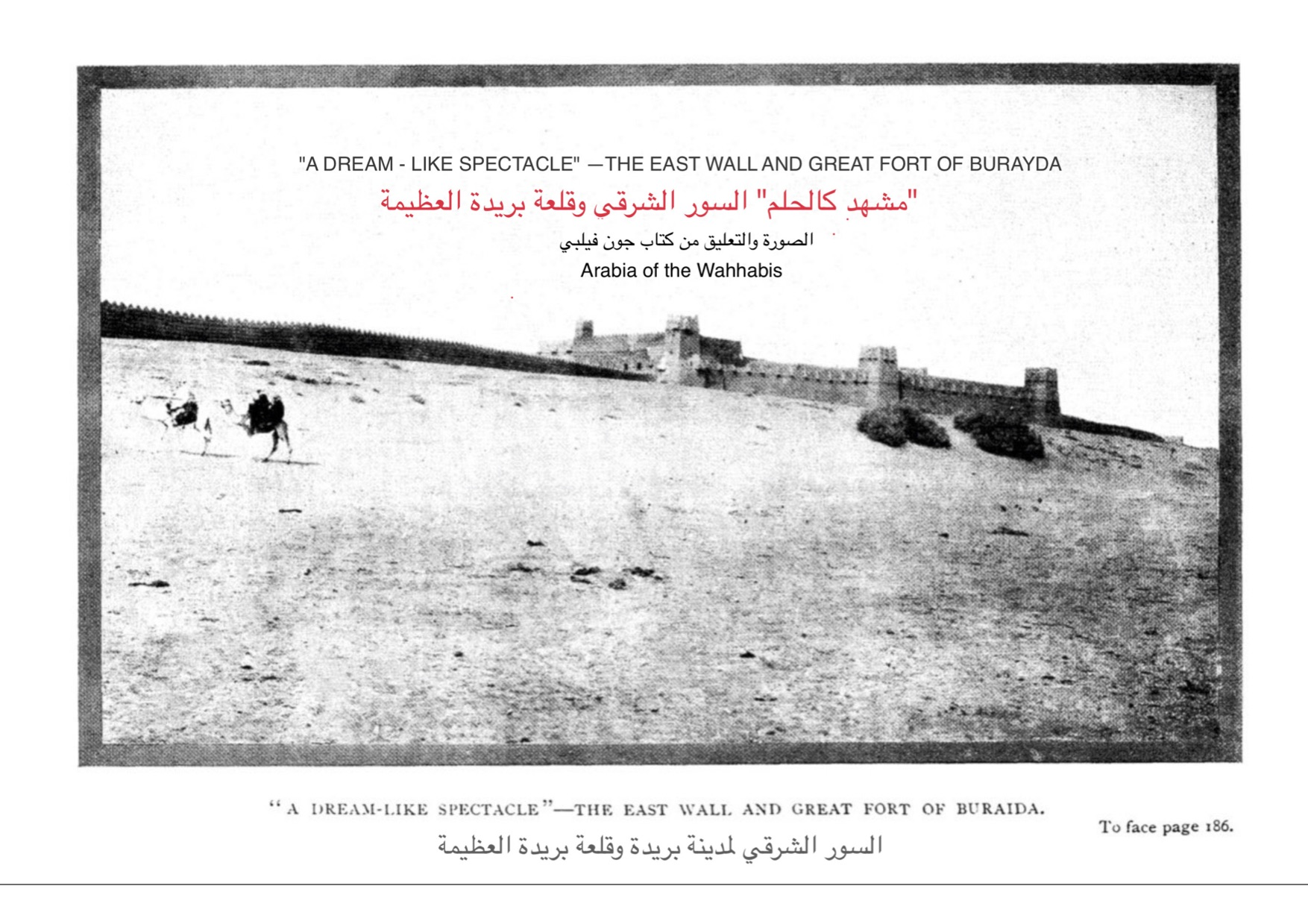 السور الشرقي وقلعة بريدة العظيمة وبداخلها قصر الحكم (كتاب جون فيلبي الذي التقط الصورة للقلعة وعلق عليها)